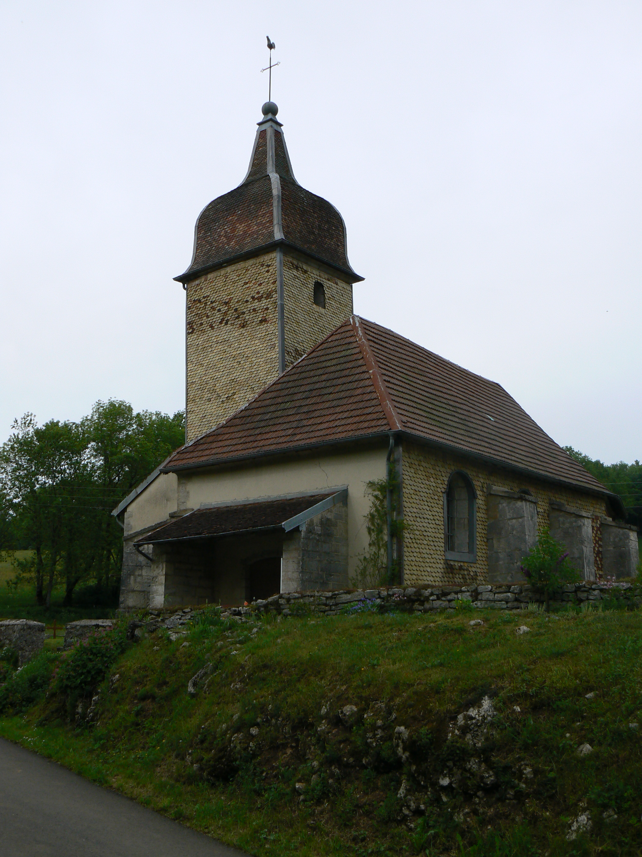 Jolie petite église perdue rénovée et remise en valeur par une association.